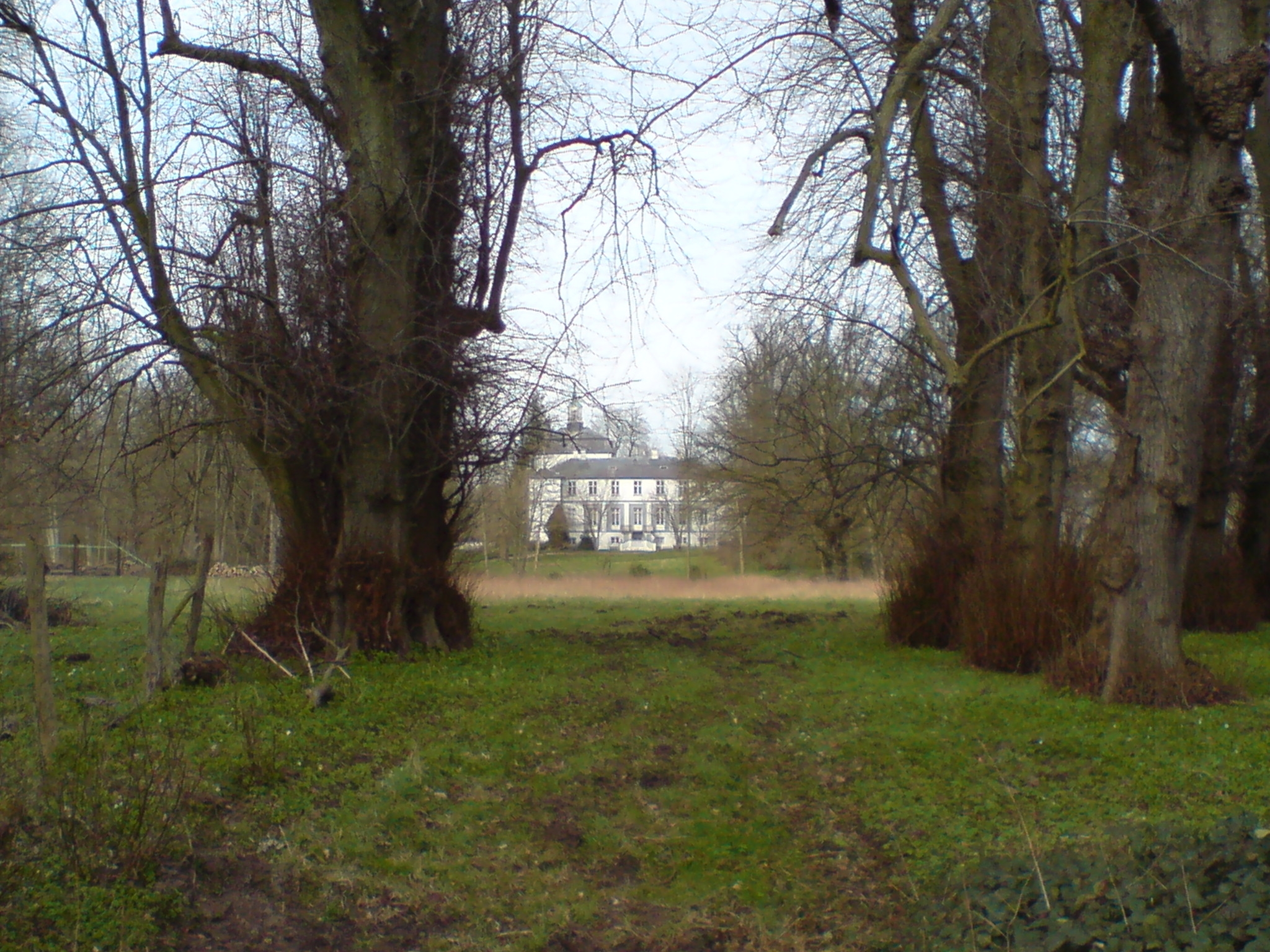 Schloss Rantzau, Garten & Südflügel